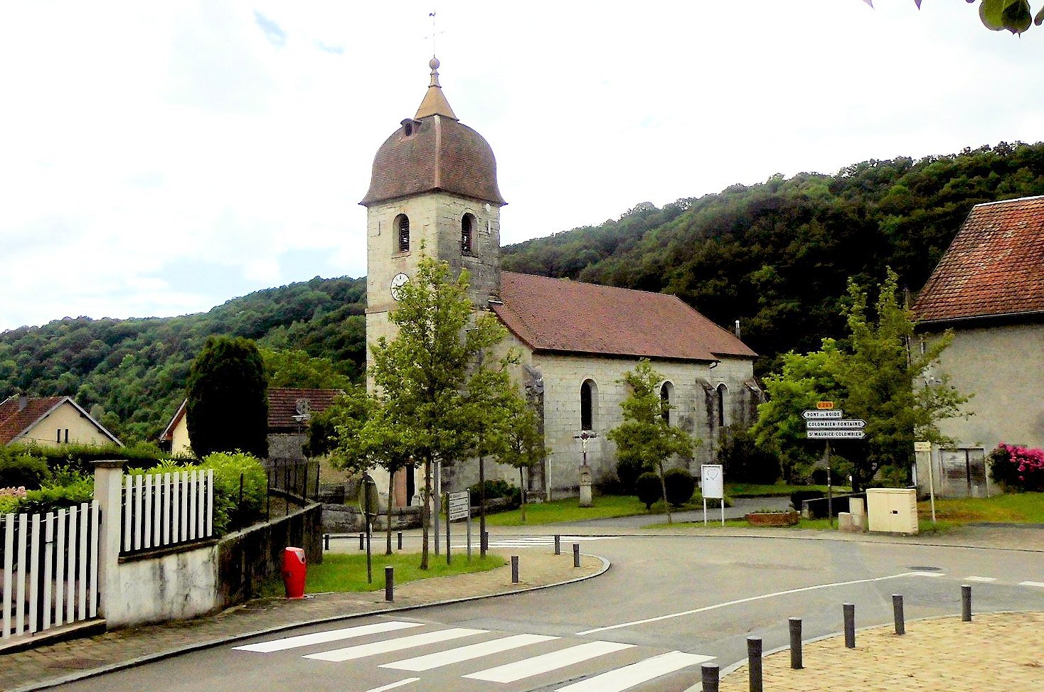 L'église Saint-Vit de Villars-sous-Écot